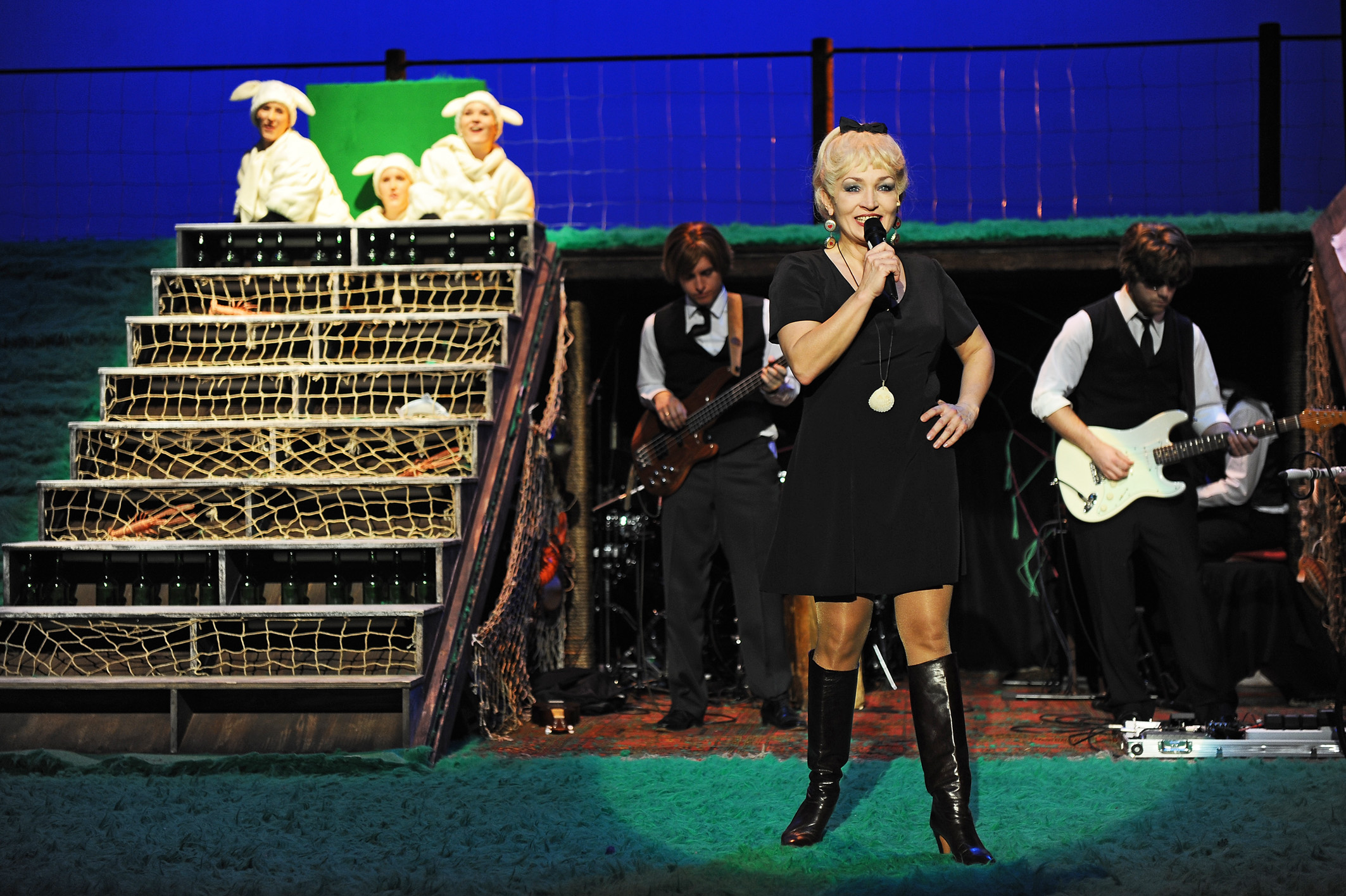 Musical "Meta, Norddeich" Landesbühne Niedersachsen Nord